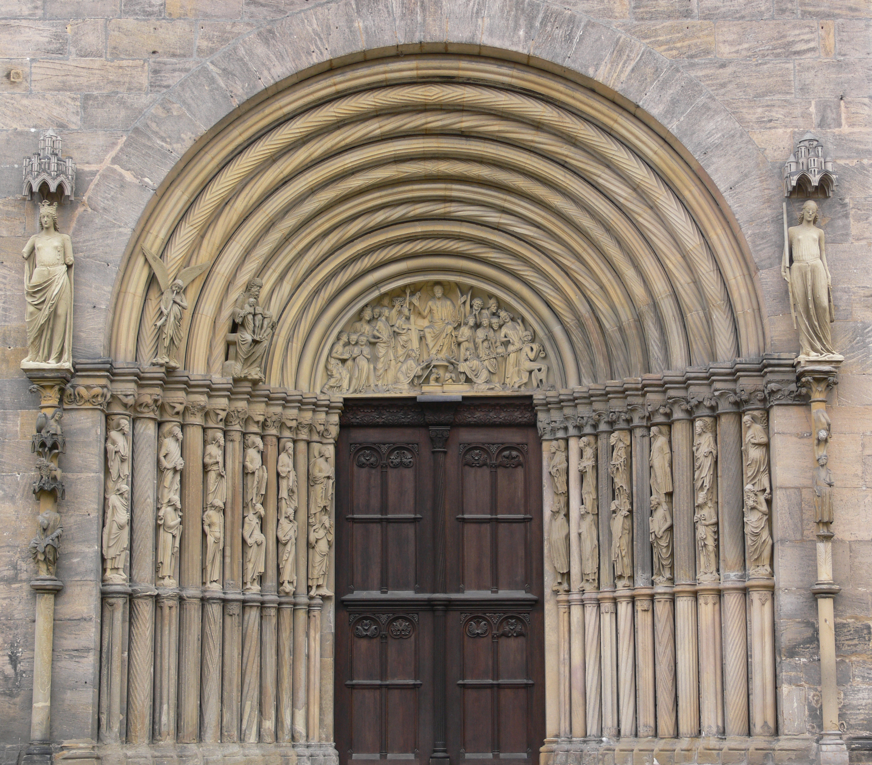 Bamberg, Dom St. Peter und St. Georg Fürstenportal